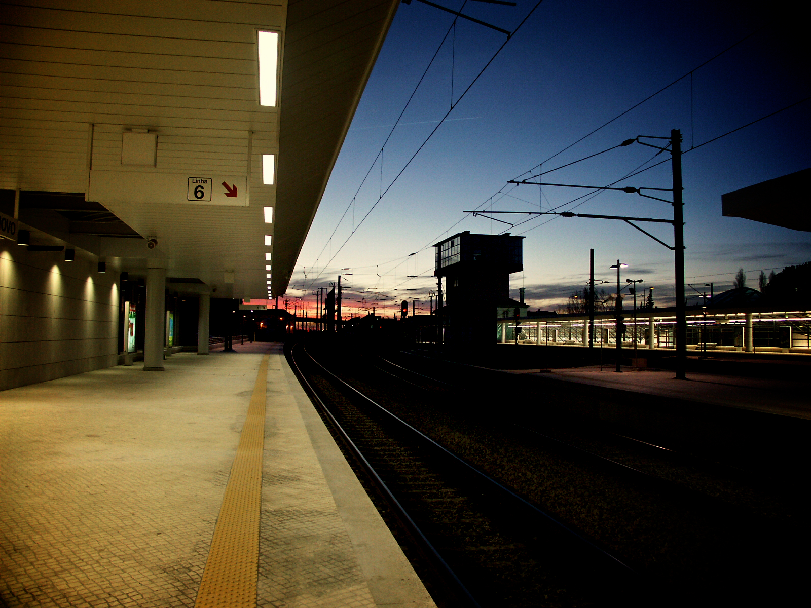 Tipo: EC [Estação de Concentração] Local: Pinhal Novo [Linha do Sul, PK 36 • Linha do Alentejo, PK 15] Data e hora: 11 de Março de 2006 [19h39]